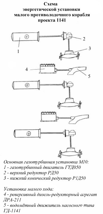 Схема энергетической установки малого противолодочного корабля проекта 1141